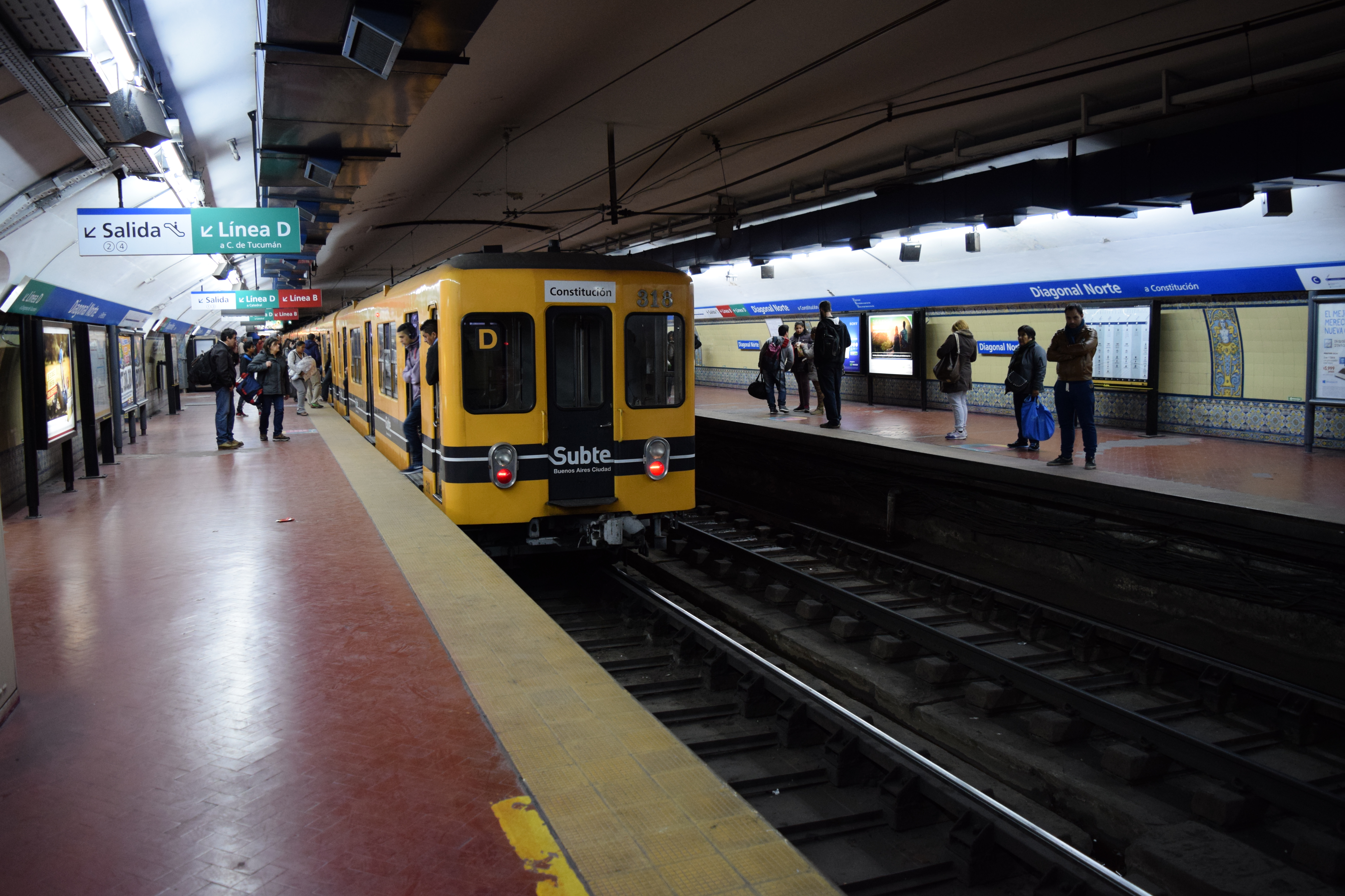 Estación Diagonal Norte, de la Línea C del subterráneo de Buenos Aires.